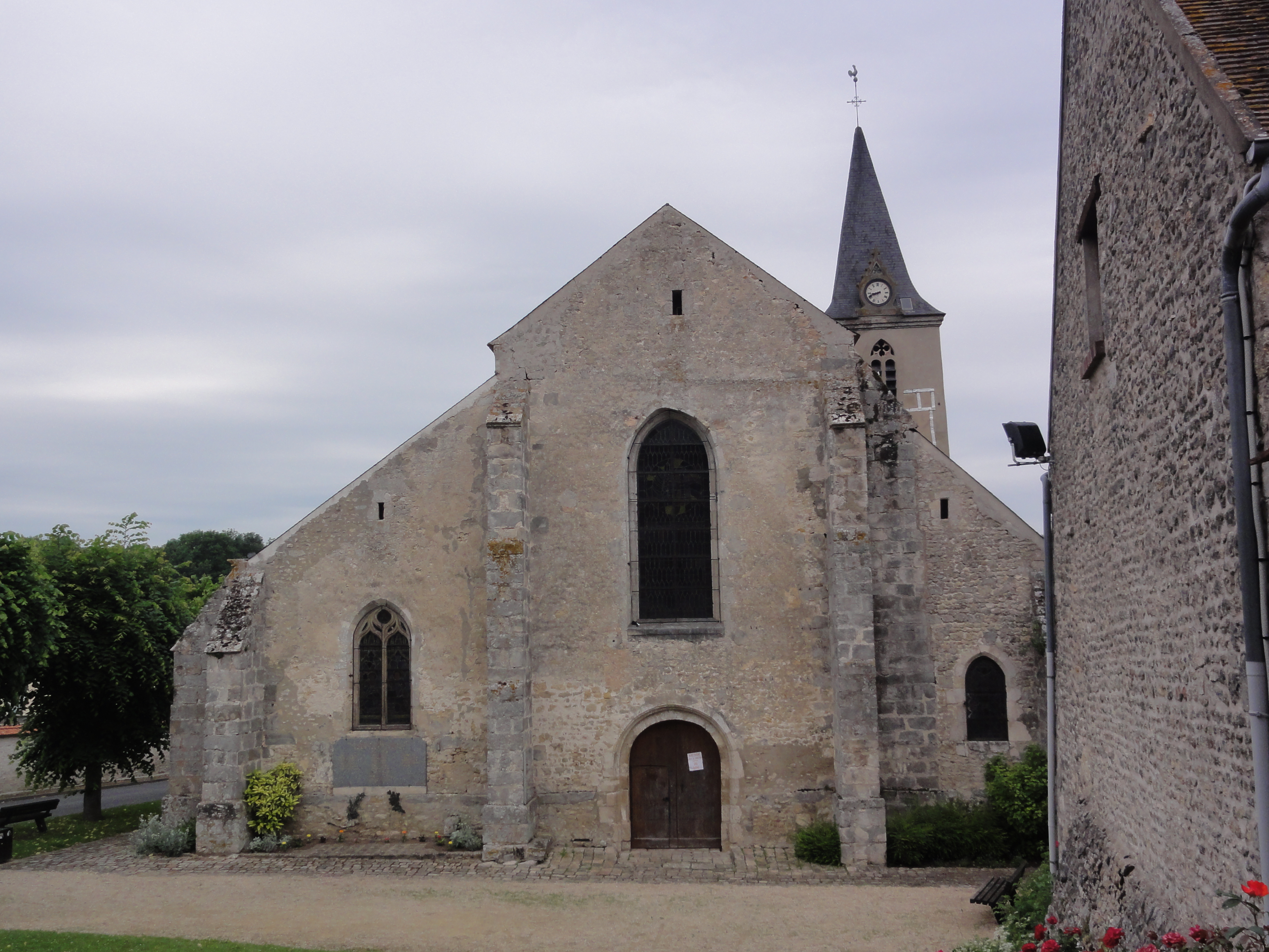 Ormoy-la-Rivière (Essonne) église .